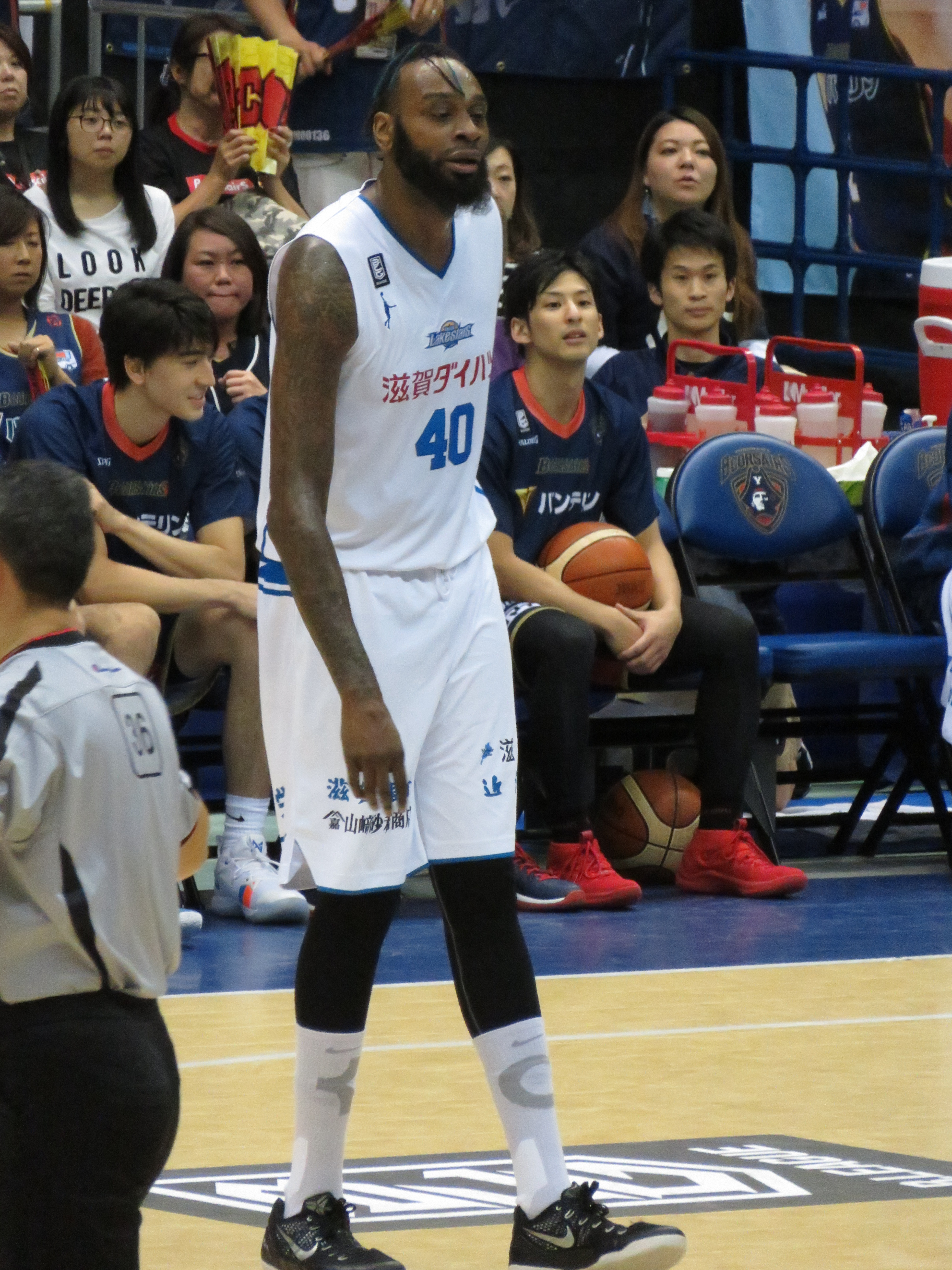 2018年 10月20日 2018-19 B1 第三節 横浜-滋賀 横浜国際プール